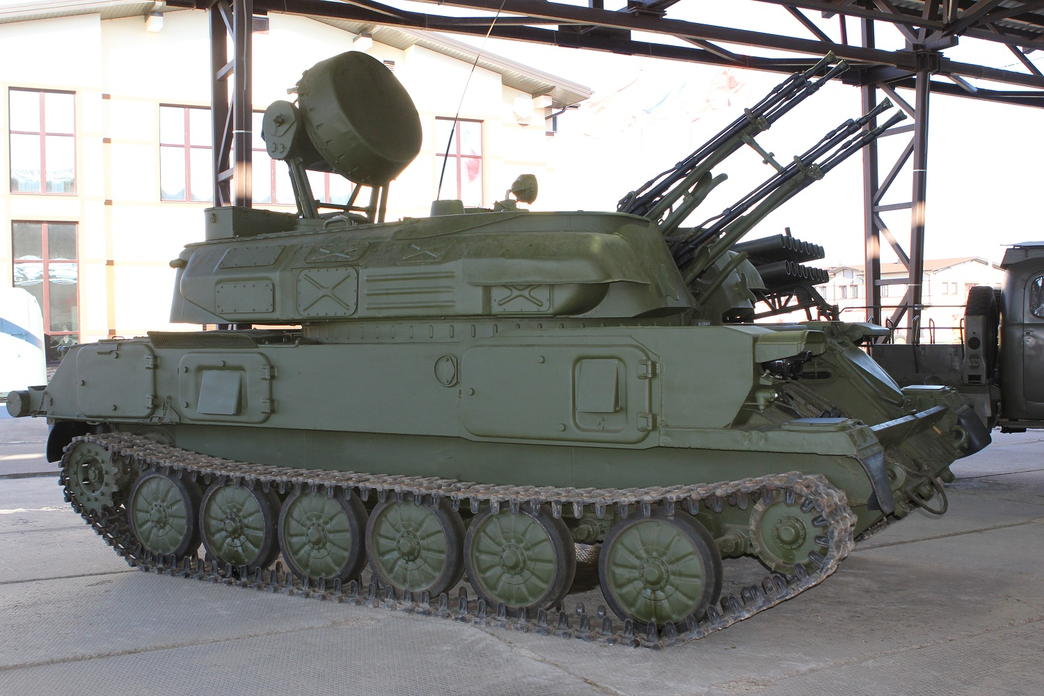 23-мм зенитная самоходная установка ЗСУ-23-4 «Шилка» в Музее отечественной военной истории